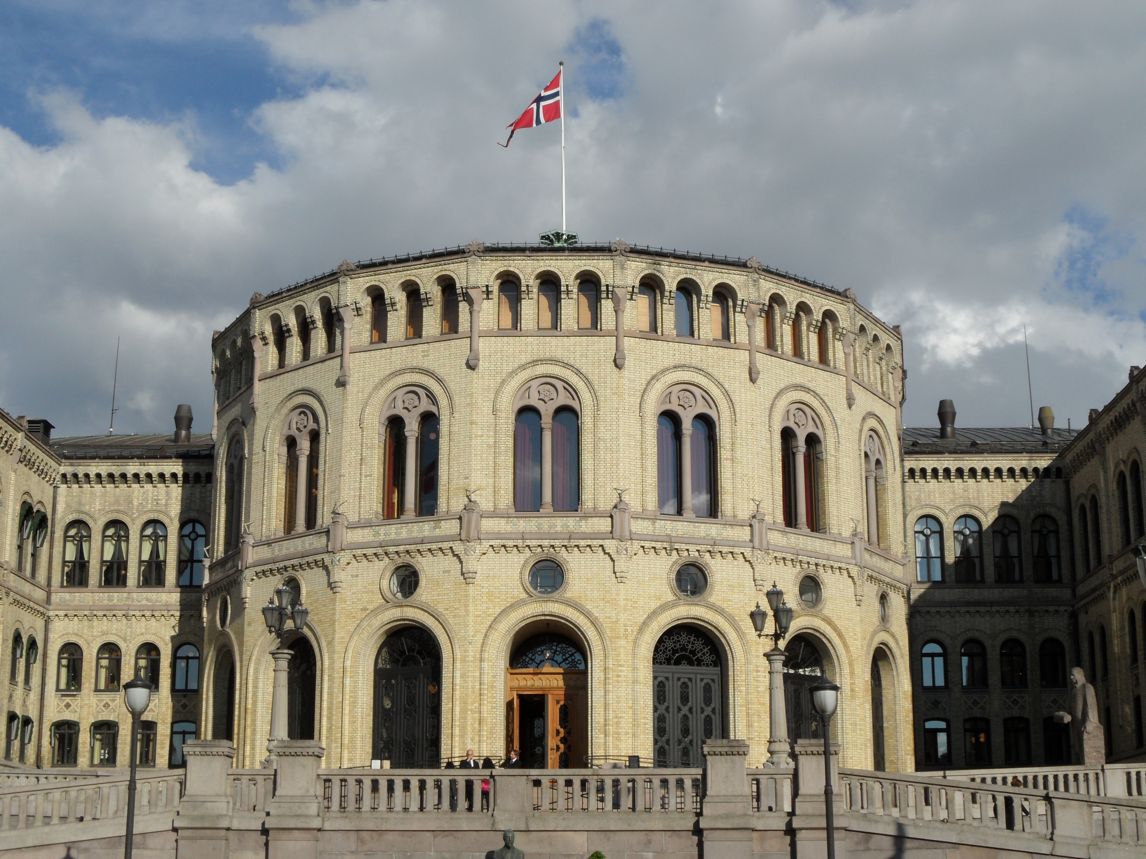 Das Parlamentsgebäude (Stortingsbygningen) von Norwegen